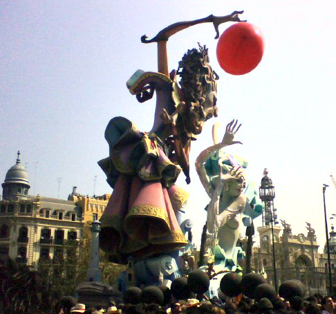 Fotografía de la falla (escultura combustible) de la plaza del Ayuntamiento, minutos antes de la mascletá del Sábado 17/Marzo/2007. Un balón hinchable de color rojo se situó en el lugar exacto de la mano de una de las figuras que aparecen en la estatua, pareciendo formar parte de ésta. Más sobre las fallas del 2007